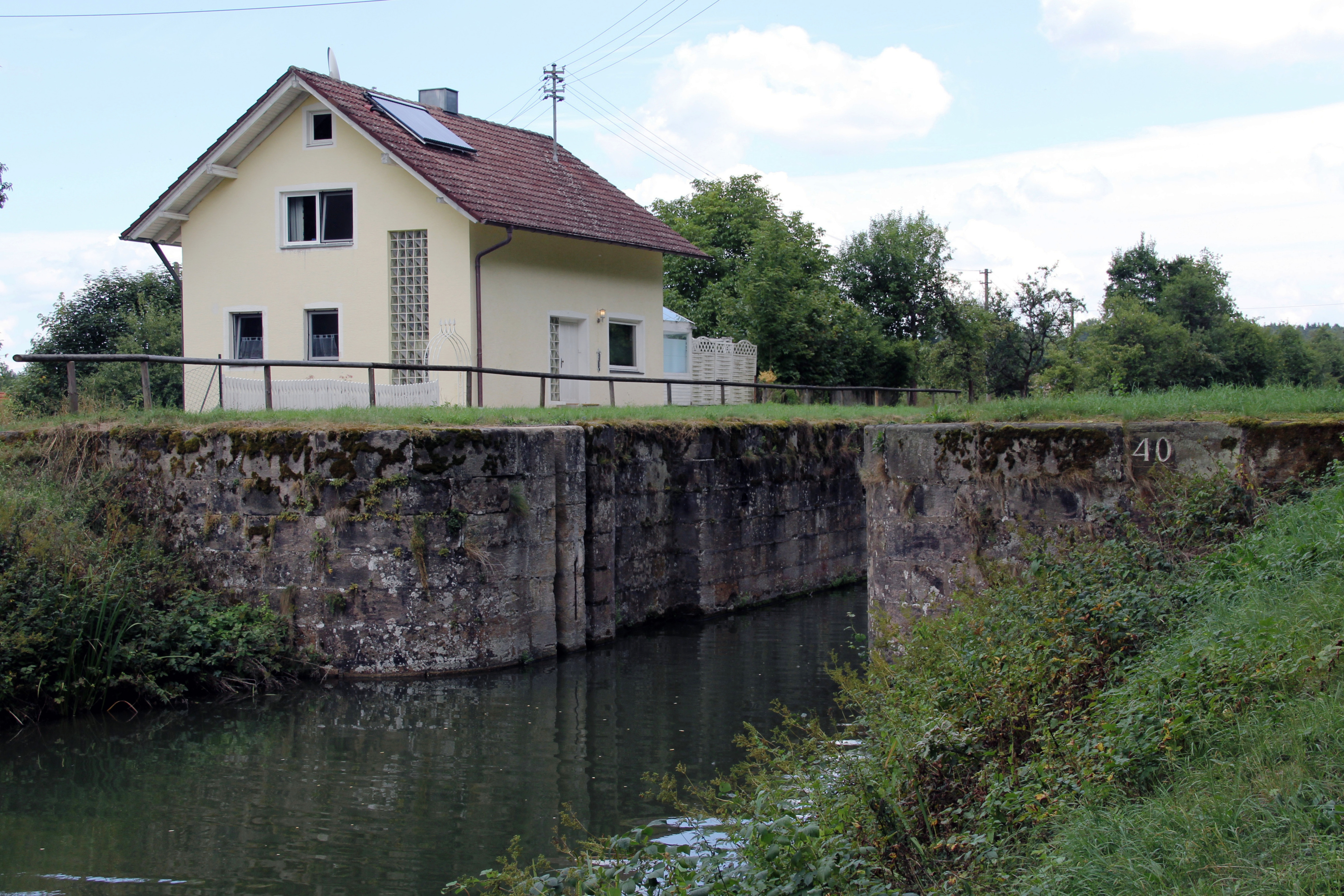 Schleuse 40, Ludwig-Donau-Main-Kanal